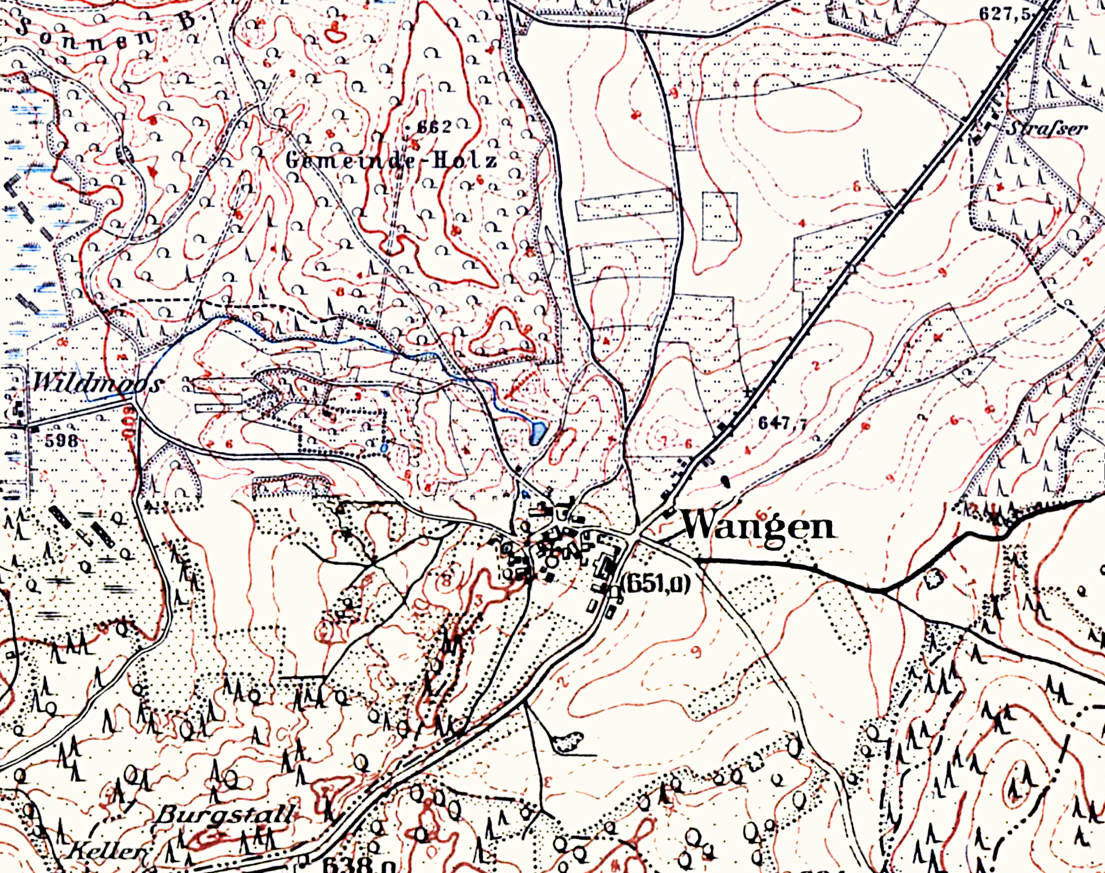 Wangen (Starnberg), Topographische Karte 1:25.000 von 1910, mit den Vororten Wildmoos (links außen), Unterschorn unter damaligen Bezeichnung Straßer (rechts oben), Schorn (rechts außen) und Fercha (unten).